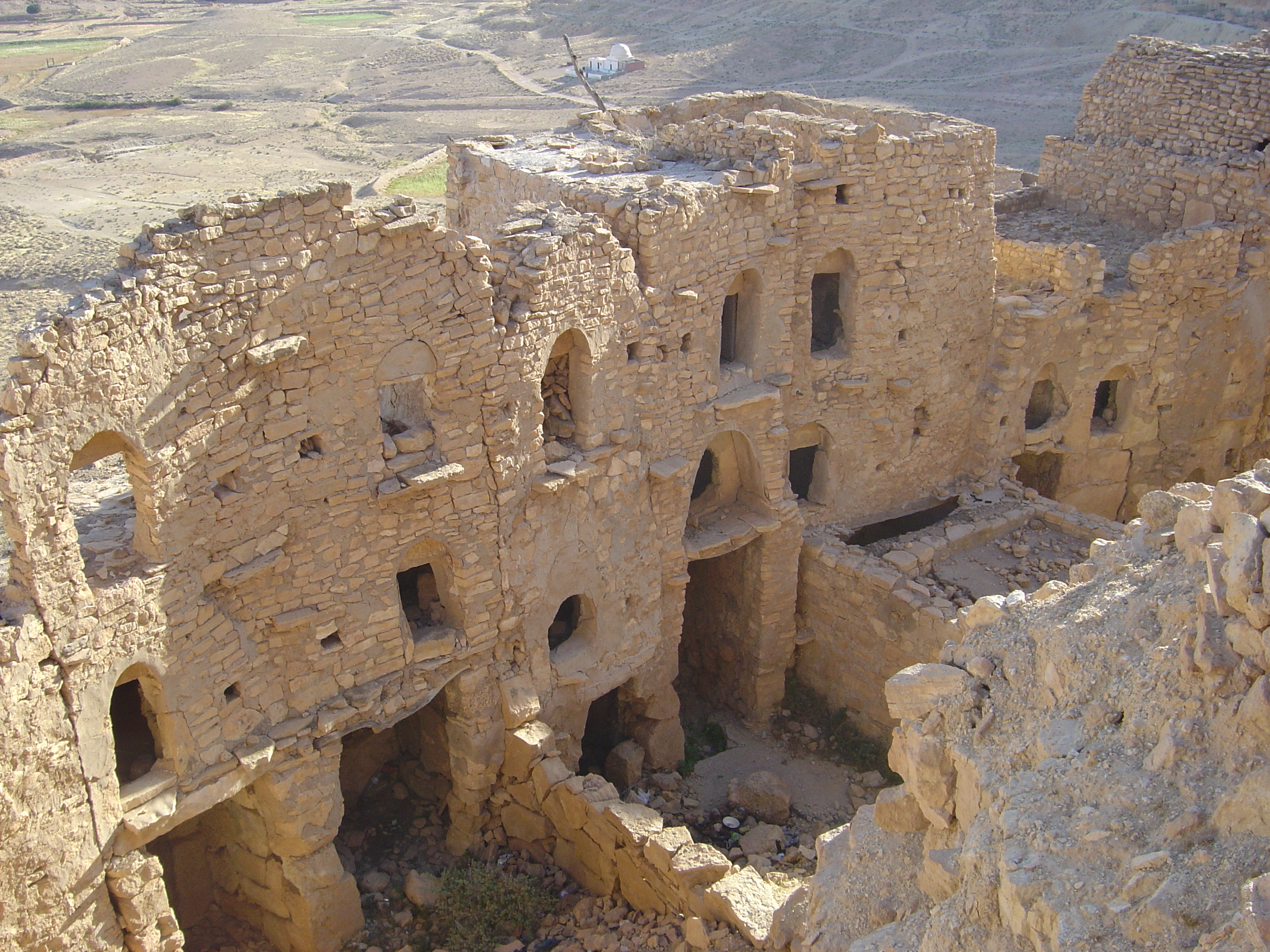 Auteur: Adel BARHEM Lieu: Ksar Douiret (Village antique) Date: 7 avril 2006 Commentaire: Ksar Berbère Appareil photo: Sony P10